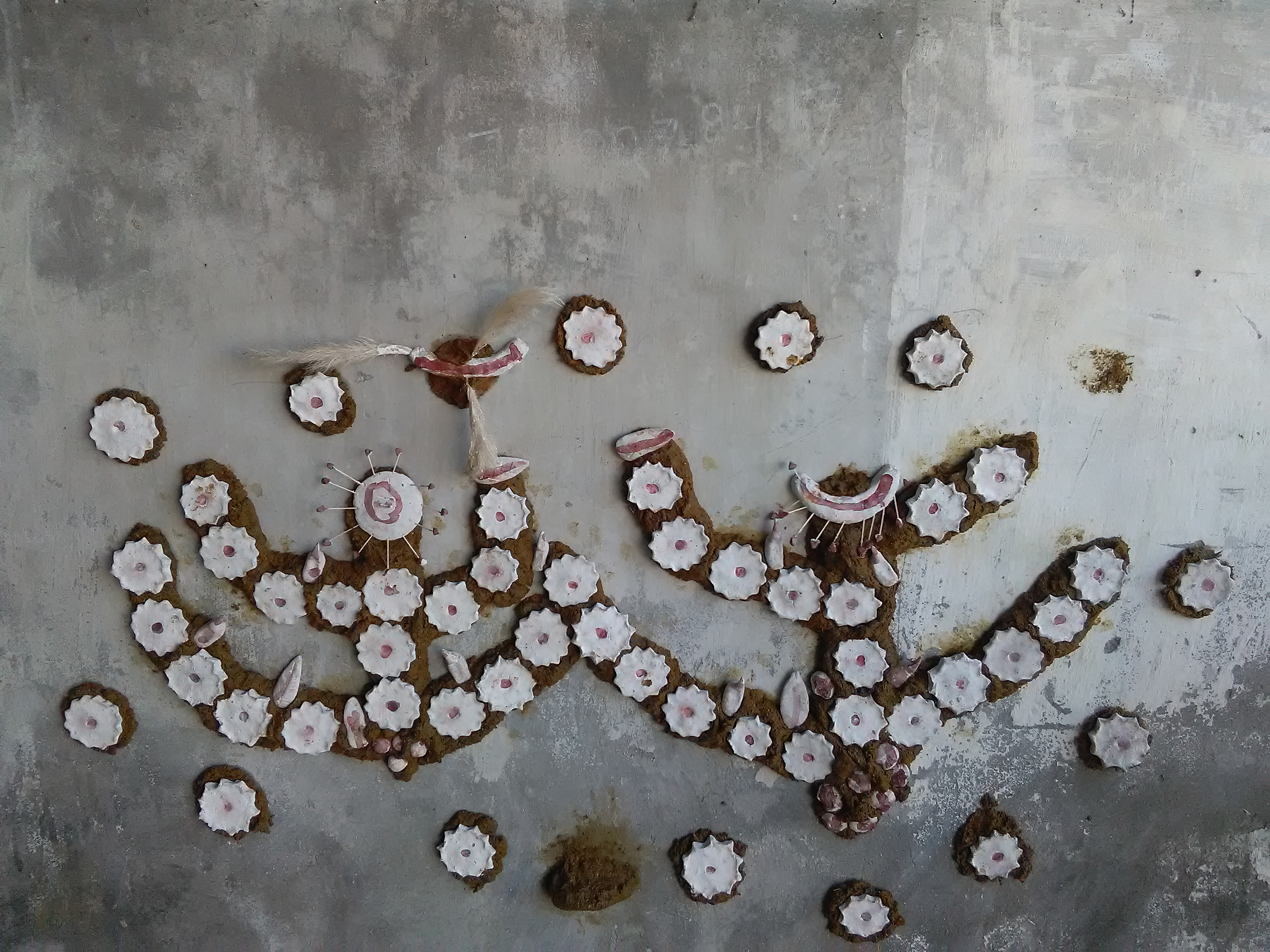 ਪੰਜਾਬੀ: ਇਹ ਮੇਰਾ ਆਪਣਾ ਕੰਮ ਹੈ